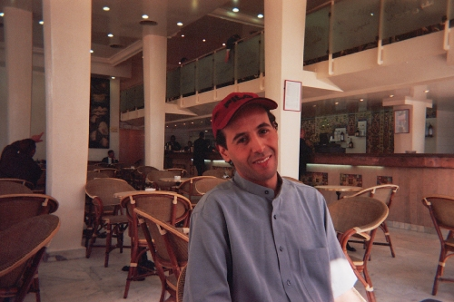 Photo du cyberdissident tunisien Zouhair Yahyaoui après sa sortie de prison.